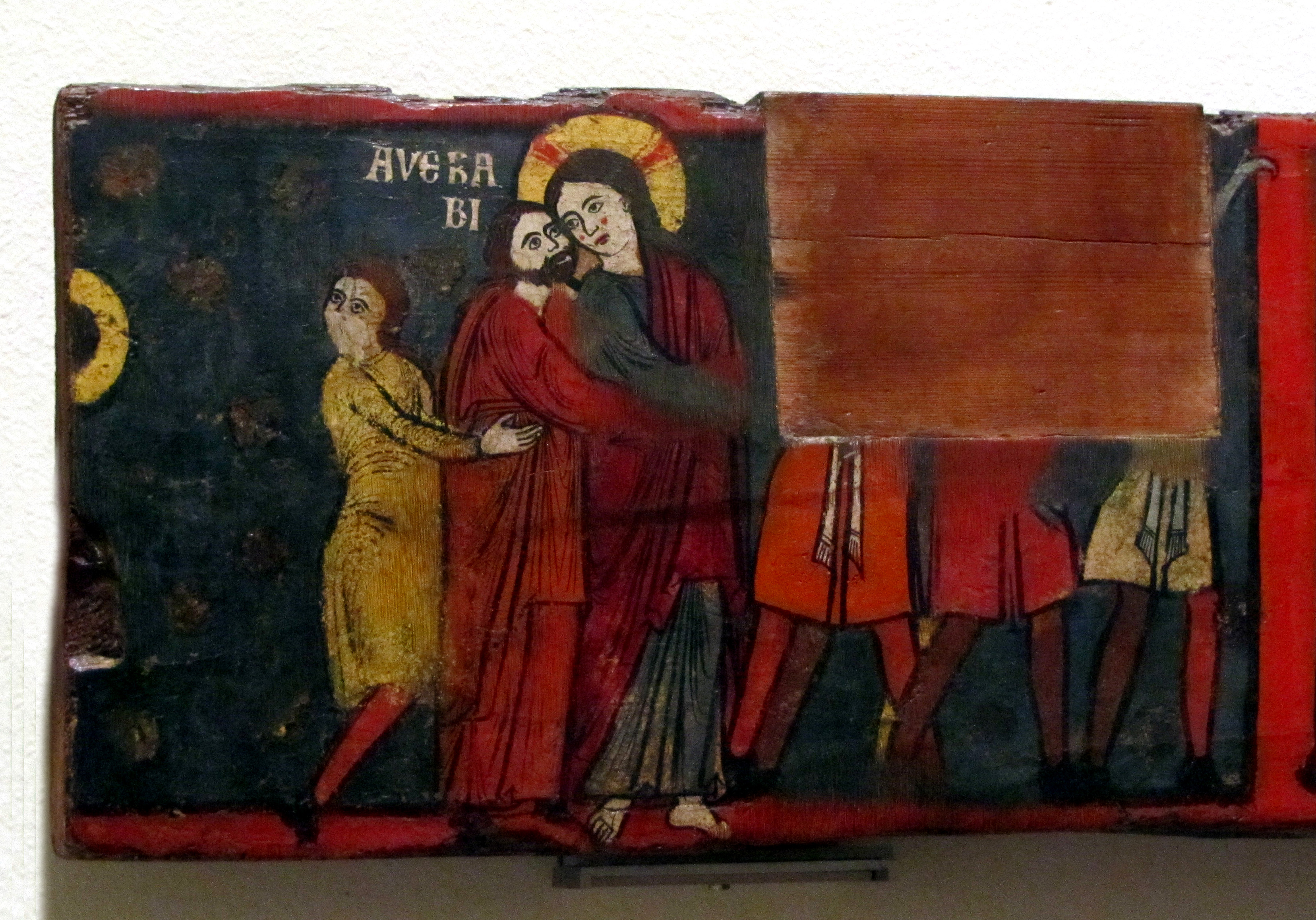 La Biga de la Passió és una peça de la col·lecció permanent del Museu Nacional d'Art de Catalunya de la que no se sap el seu lloc de procedència. Podria haver format part d'un baldaquí (com les que subjectaven la taula del Baldaquí de Tost) o hauria pogut ser una biga travessera (com la de l'absis de Toses). Conté sis episodis de la Passió de Crist i la visita de les Maries al Sepulcre que al·ludeix a la Resurrecció. Un dels més destacats és el del Plany sobre el Crist difunt, gran exemple de la influència bizantina que caracteritza una part de l'art del 1200. La factura molt minuciosa i detallista assenyala que és obra d'un miniaturista, estretament relacionat amb la il·lustració del Liber Feudorum Maior (Arxiu de la Corona d'Aragó) i amb algun exemple de miniatura castellana.